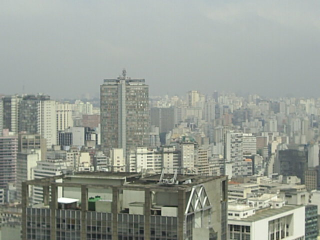 Edifício Itália, no centro de São Paulo.